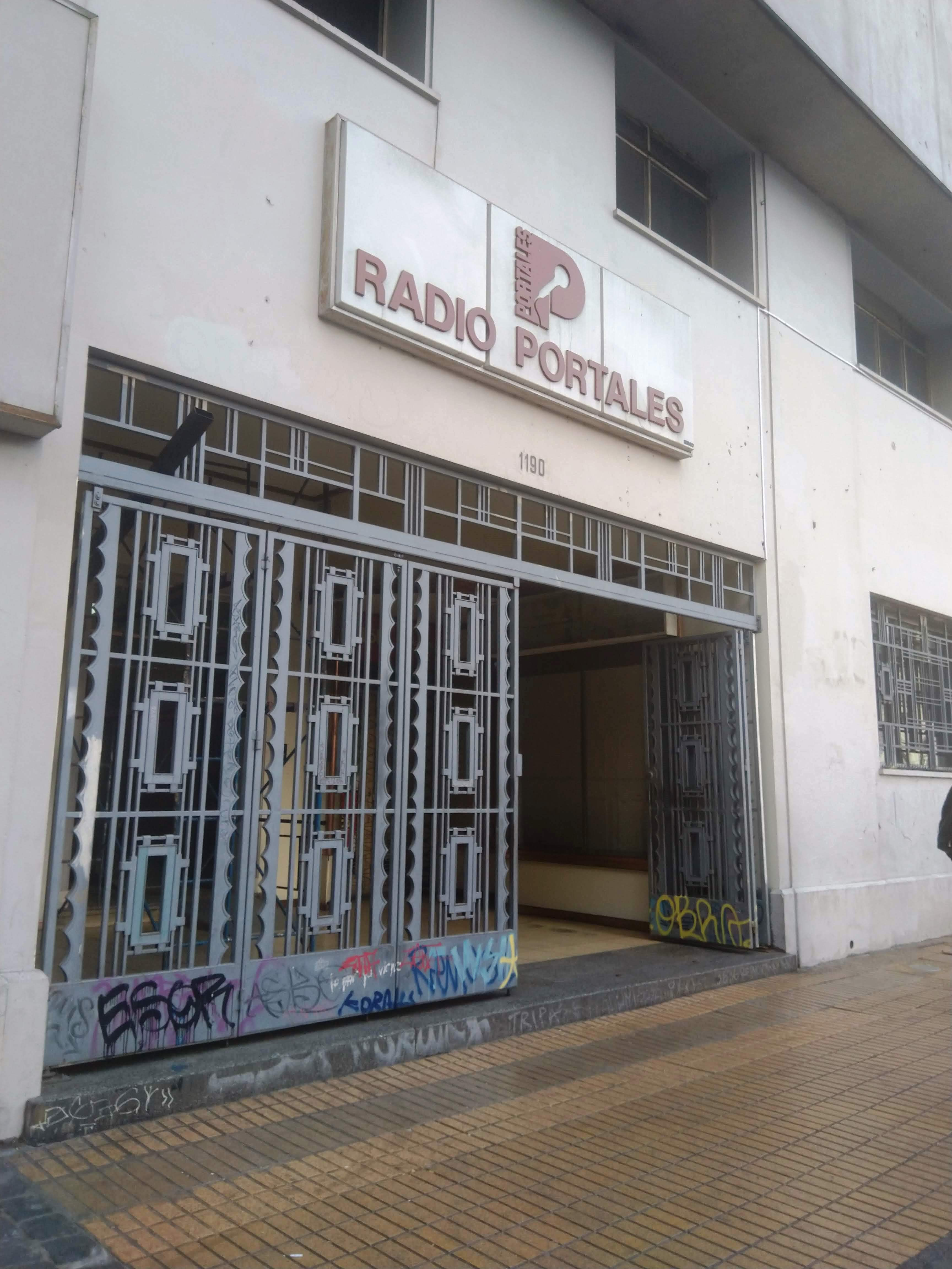 Entrada a Radio Portales de Valparaíso ubicada en la calle Condell 1190, 2º piso, frente a la Plaza Aníbal Pinto, en Valparaíso.